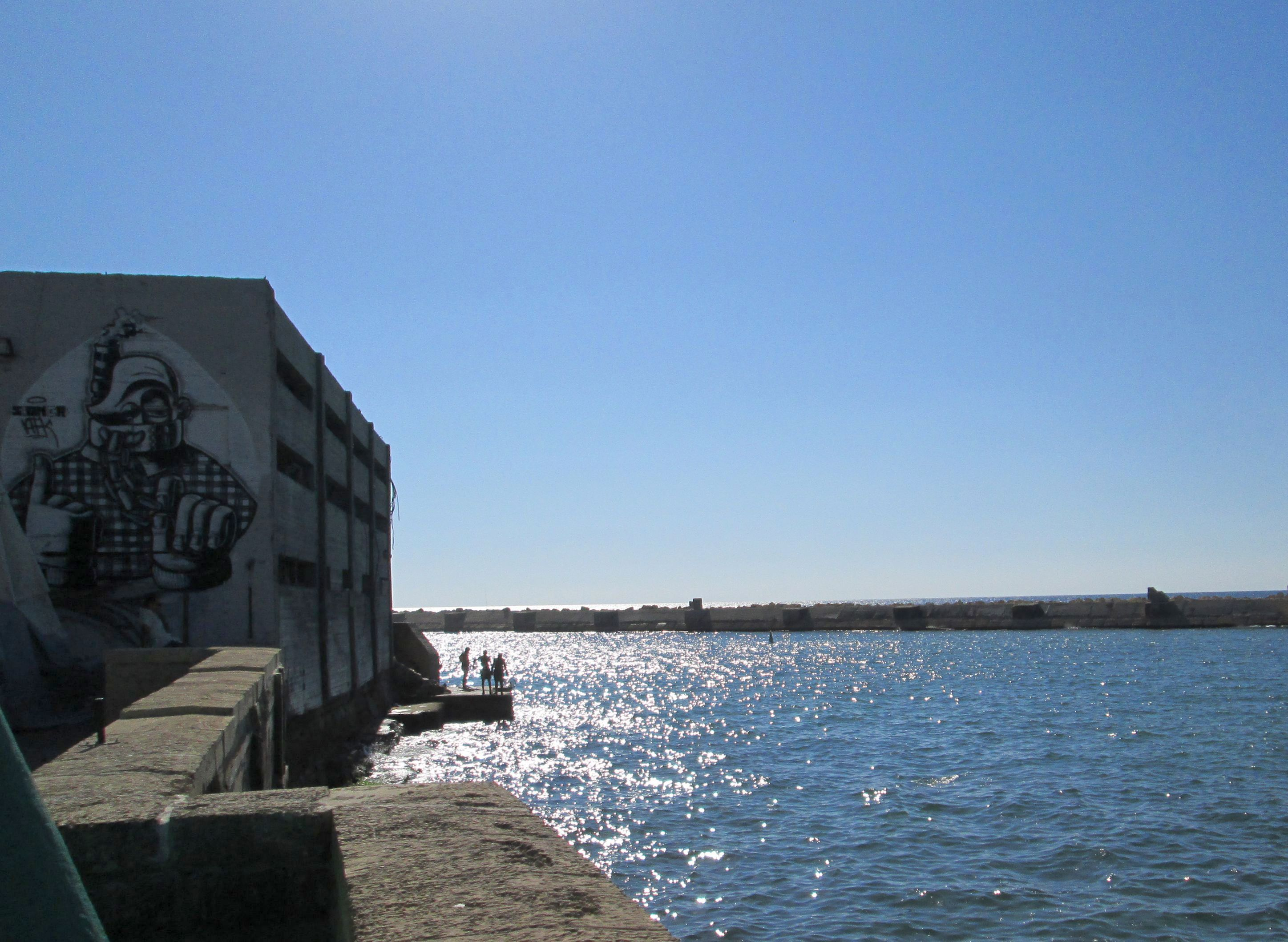 בית המכס הצפוני בנמל יפו